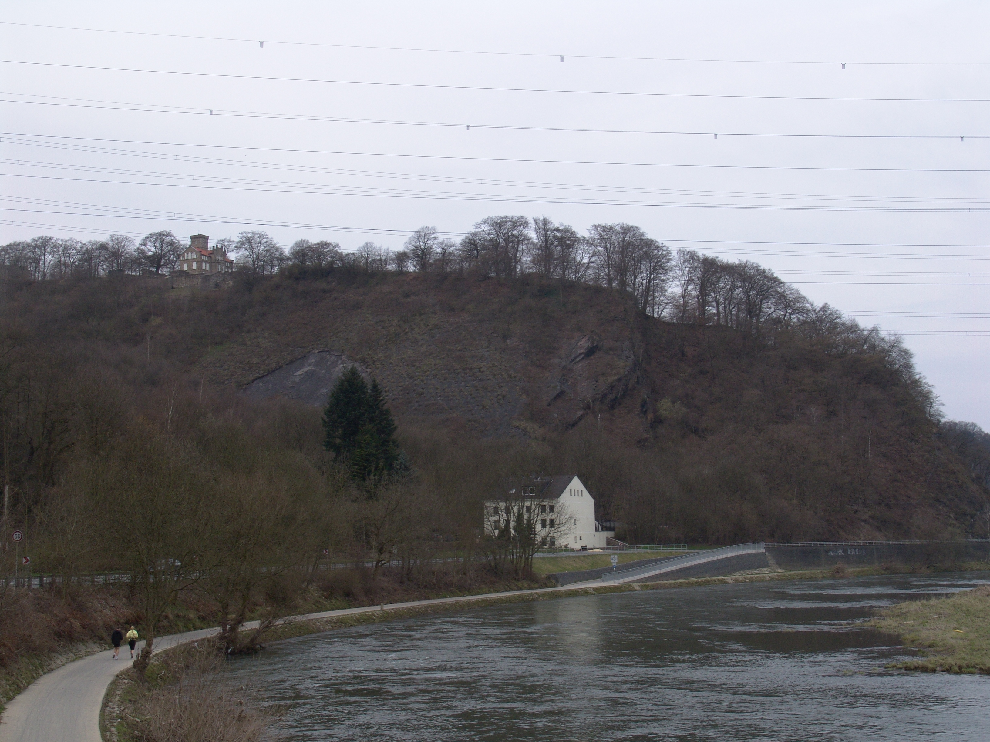 Der Leinpfad an der Ruhr unterhalb der Isenburg in Hattingen